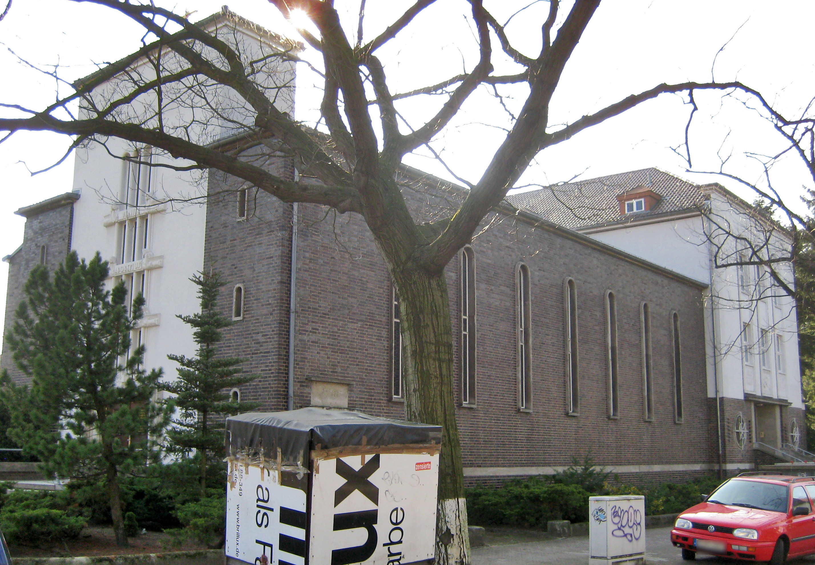 Kath. Anbetungskloster St. Gabriel, Berlin-Westend, Klosterkirche St. Mariae Verkündigung